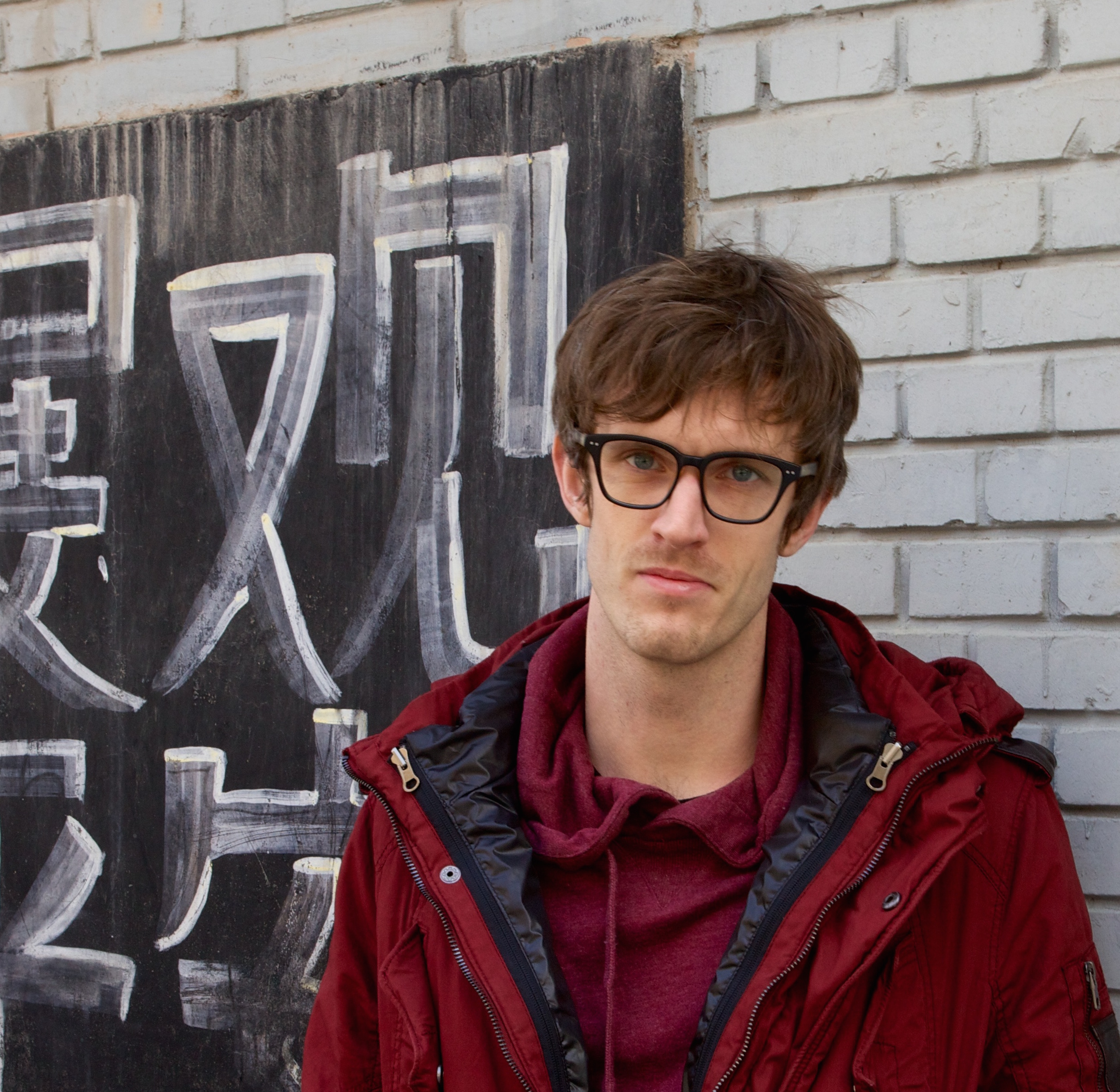 Journalisten och författaren Jojje Olsson